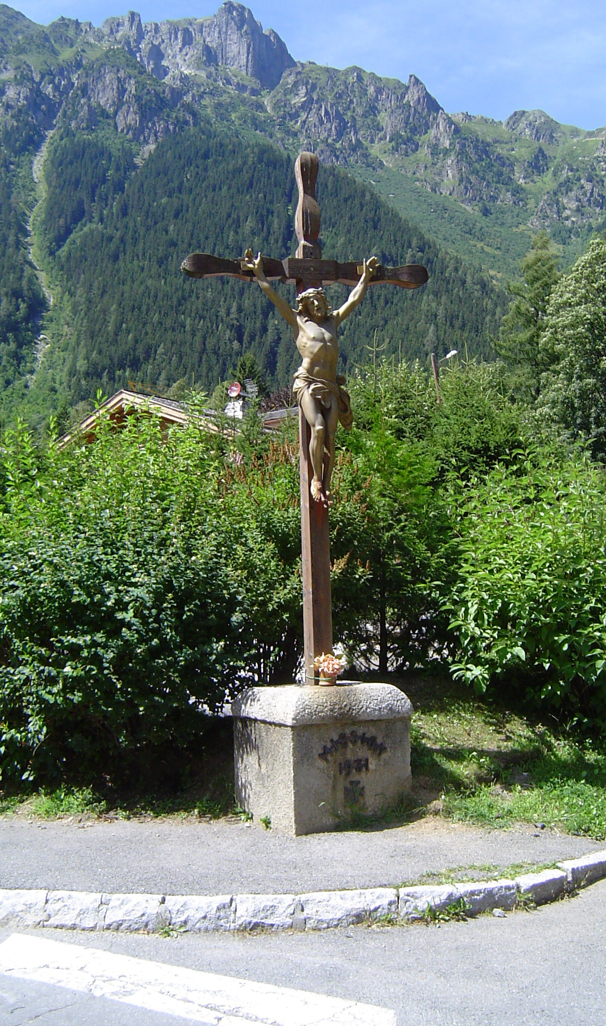 Photos prises dans la commune de Chamonix-Mont-Blanc